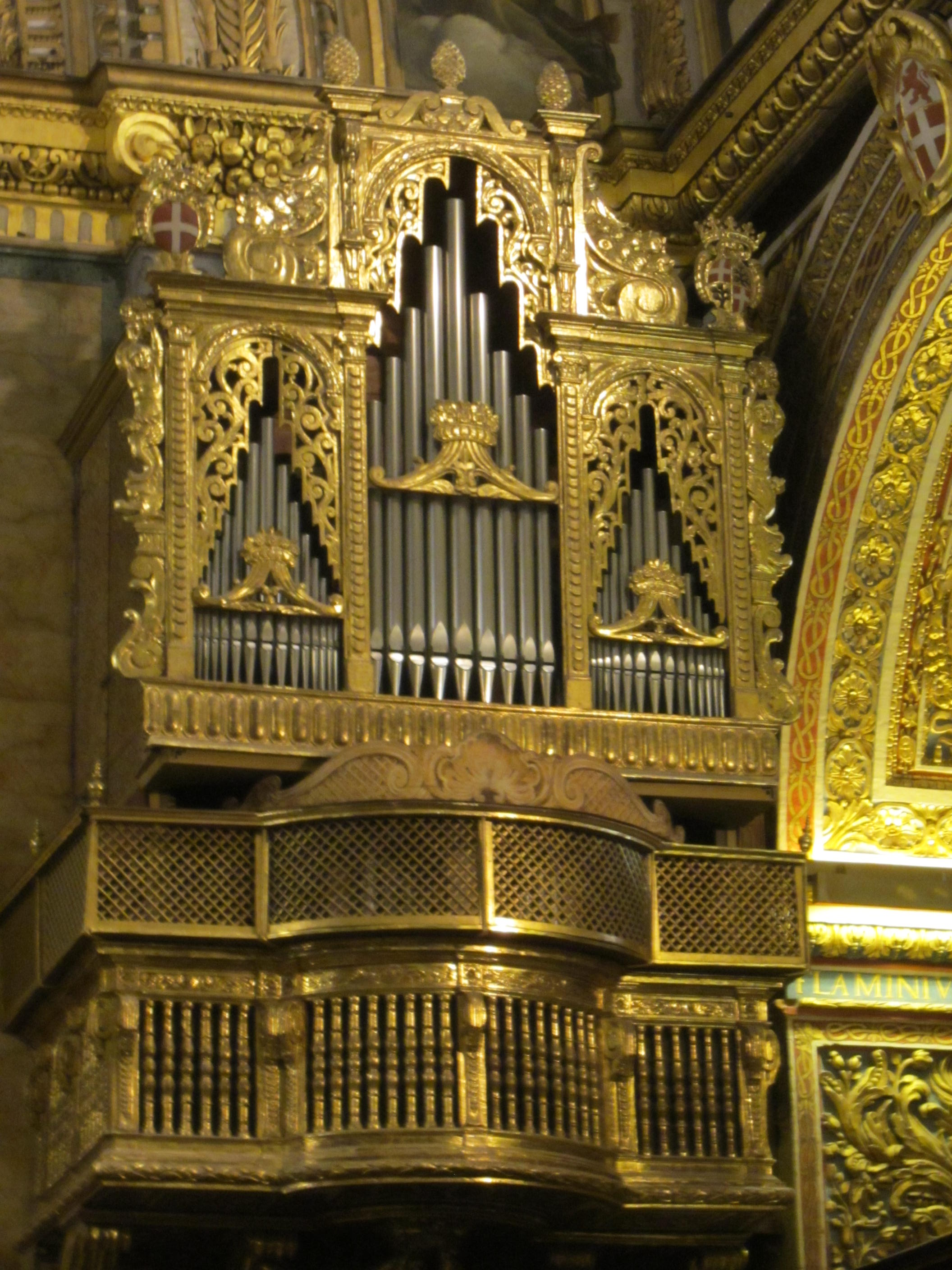 L'organo situato nella Concattedrale di San Giovanni alla Valletta